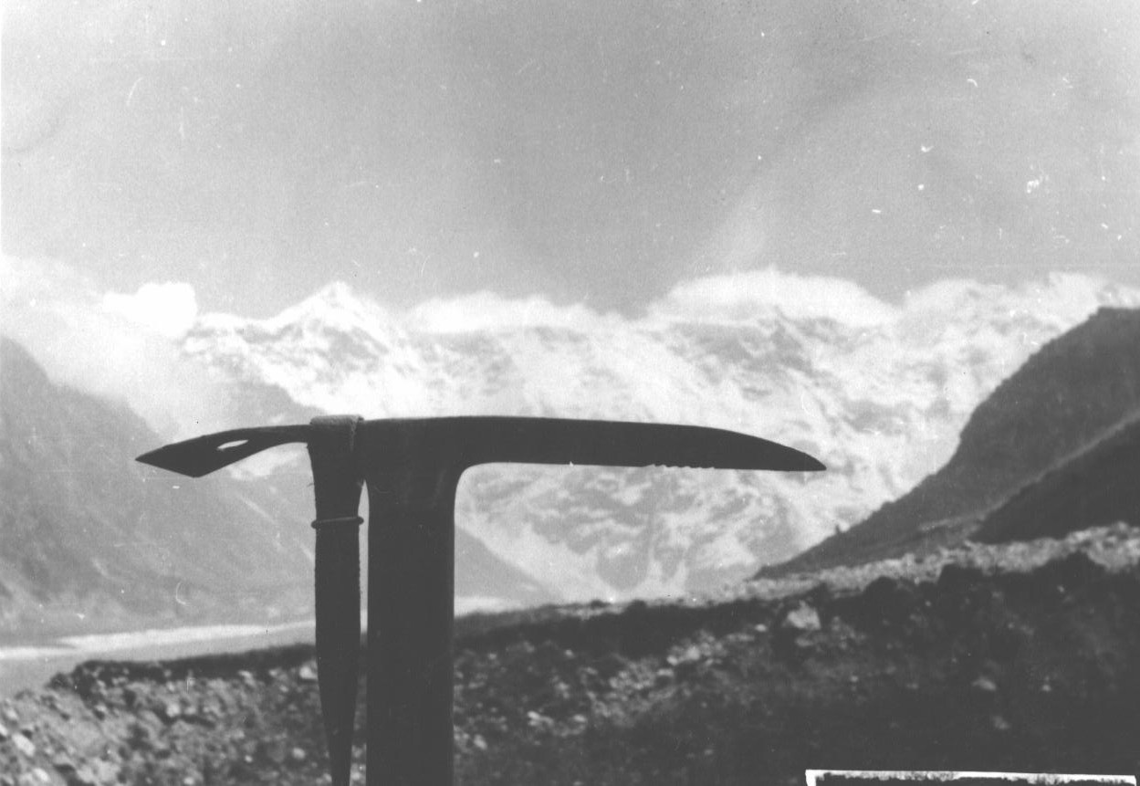 Фото